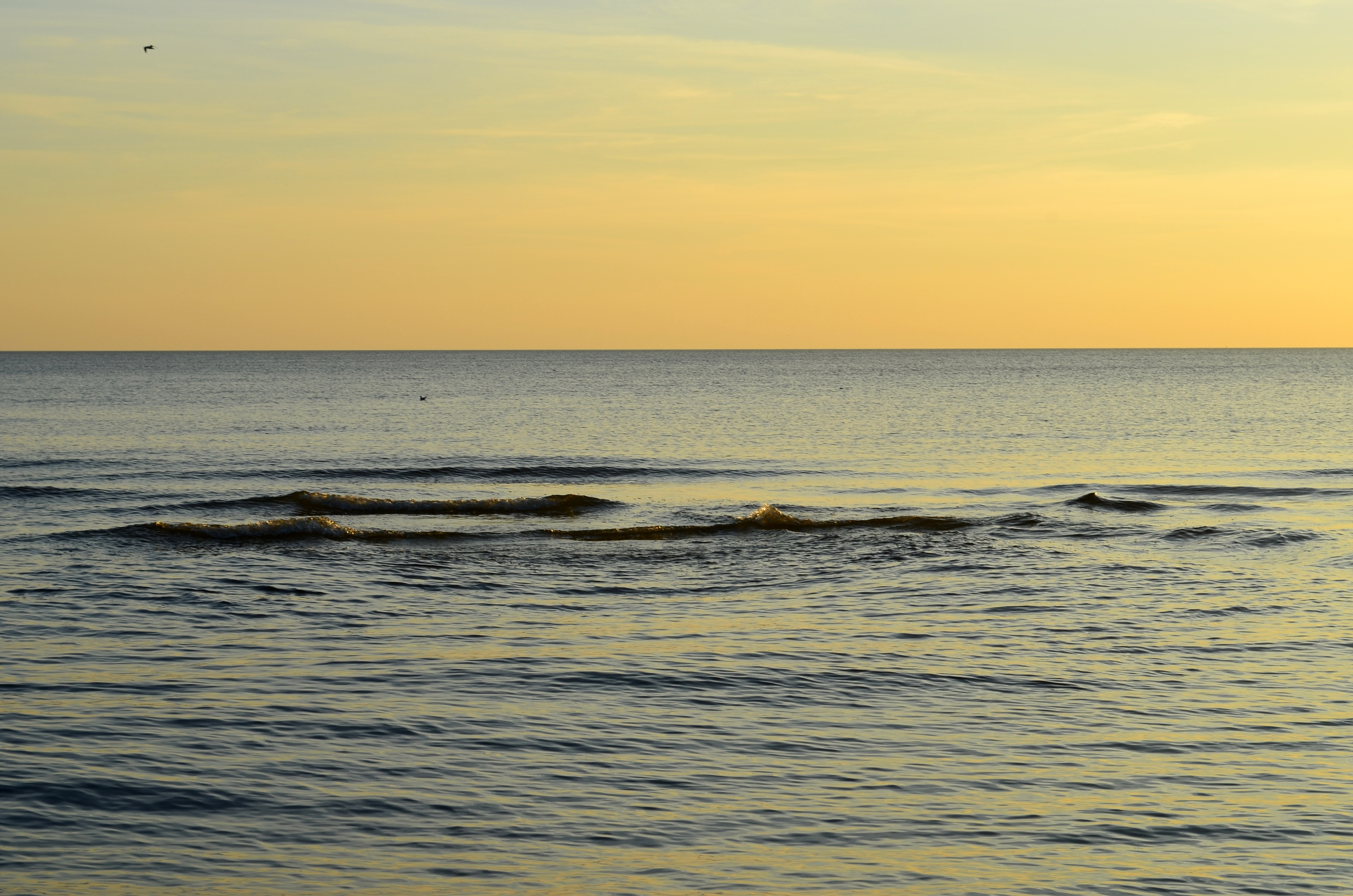 Bangų „ratas“ jūroje ties Melnrage (Klaipėda)